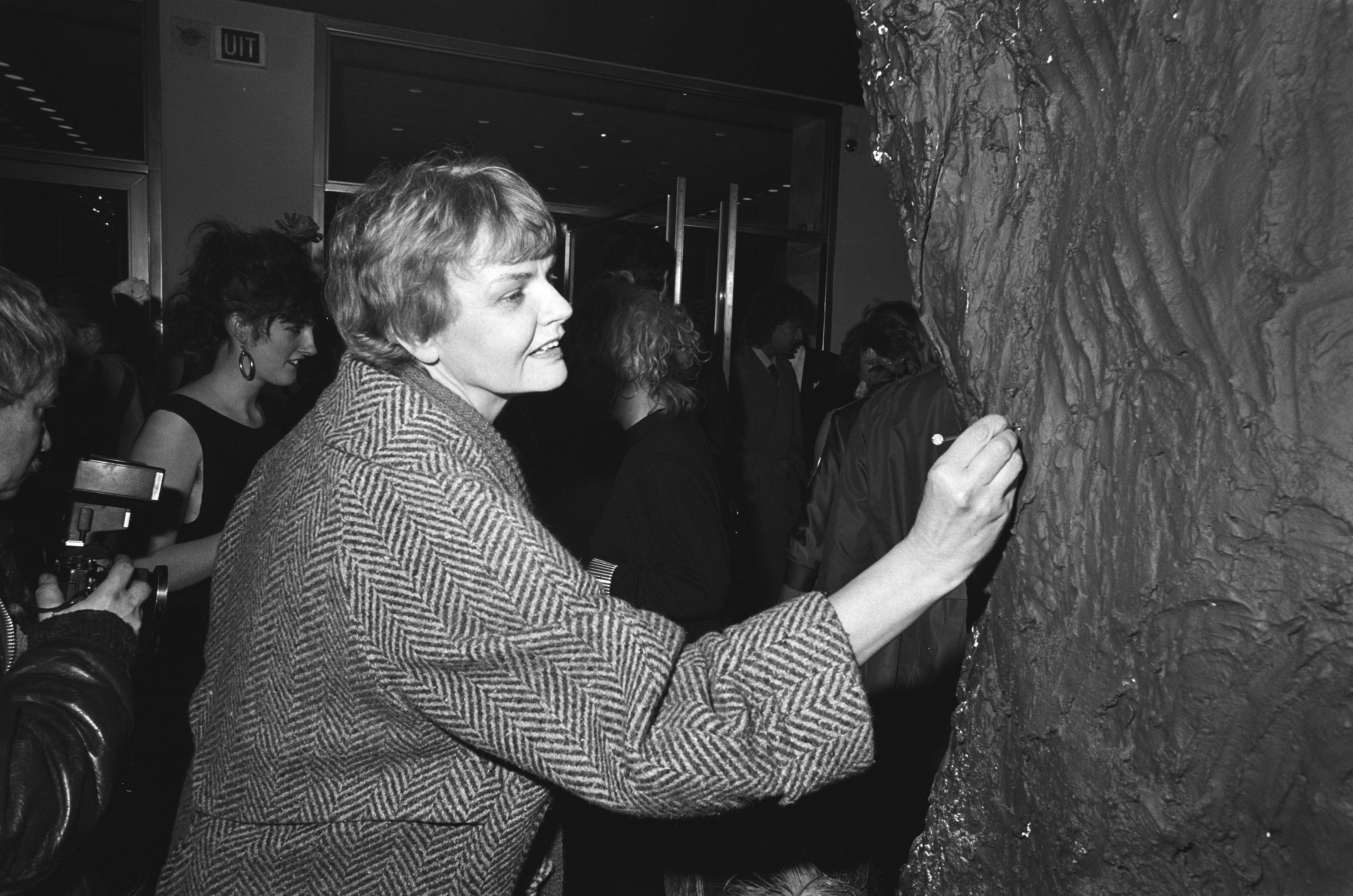 Het boekenbal, 11 maart 1986 in theater Carre in Amsterdam (Nederland)